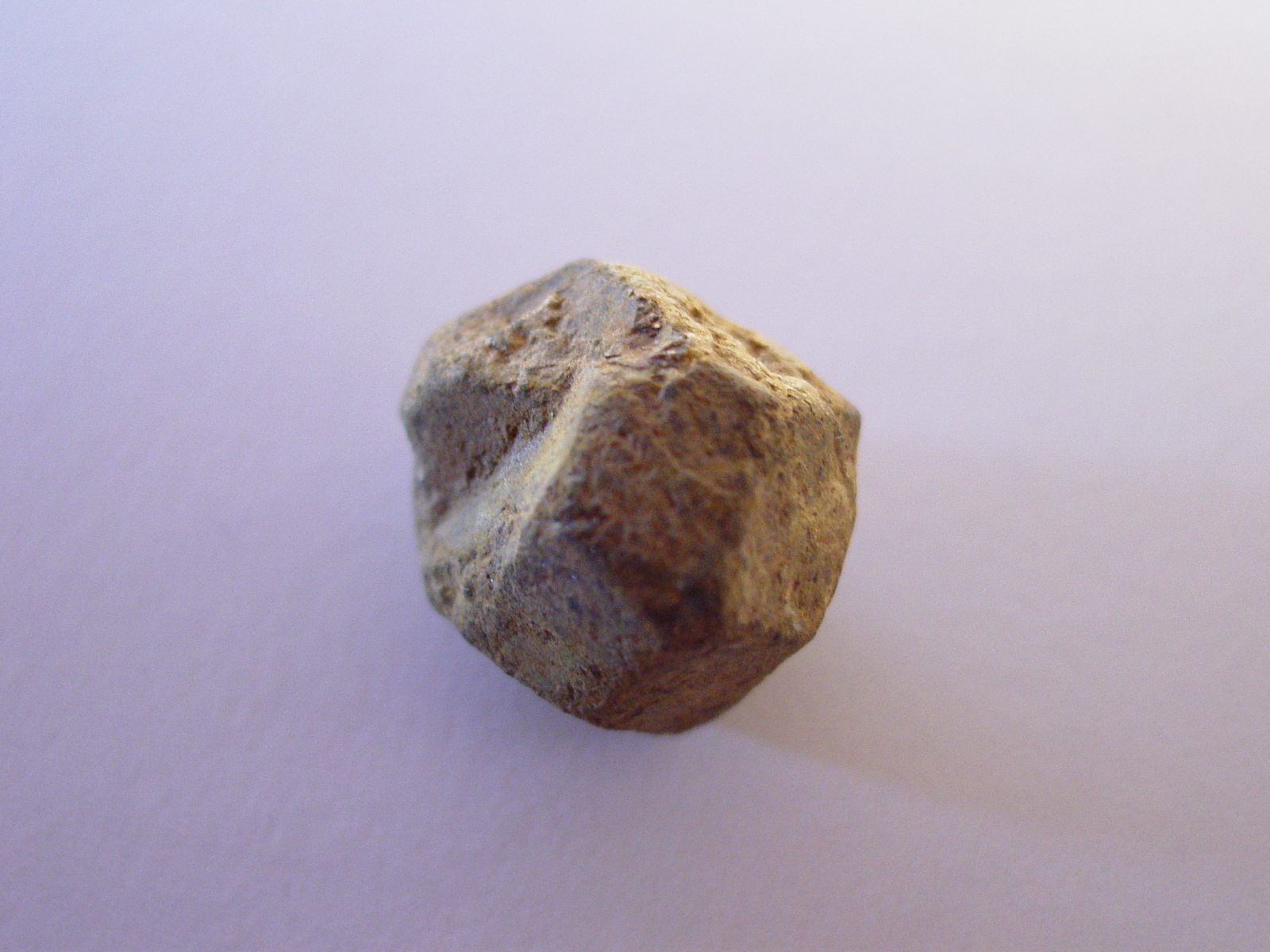 Bruine spessartien (mineraal), ca. 1,5 cm doorsnede